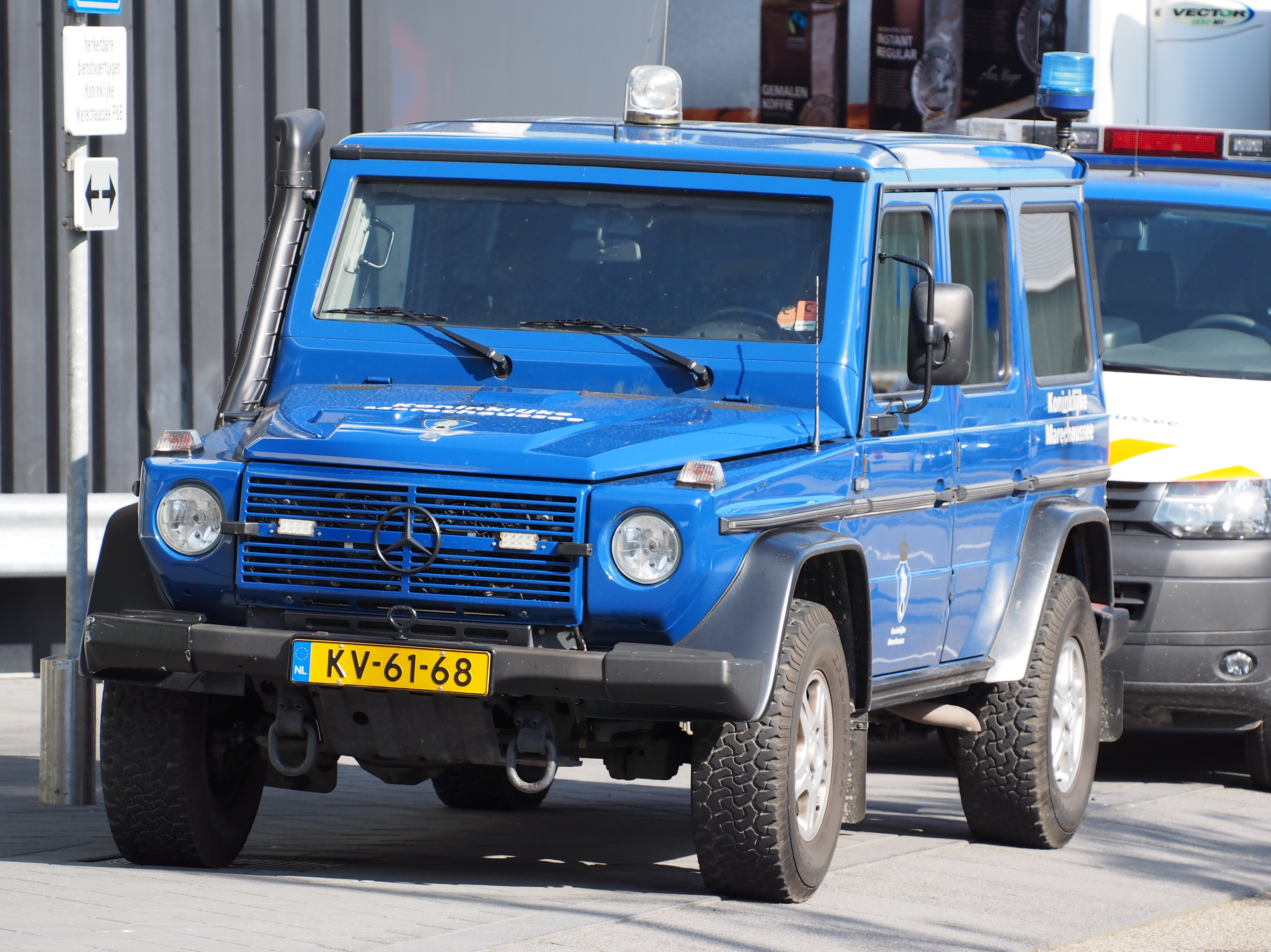 Mercedes Koninklijke Marechaussee, Schiphol.